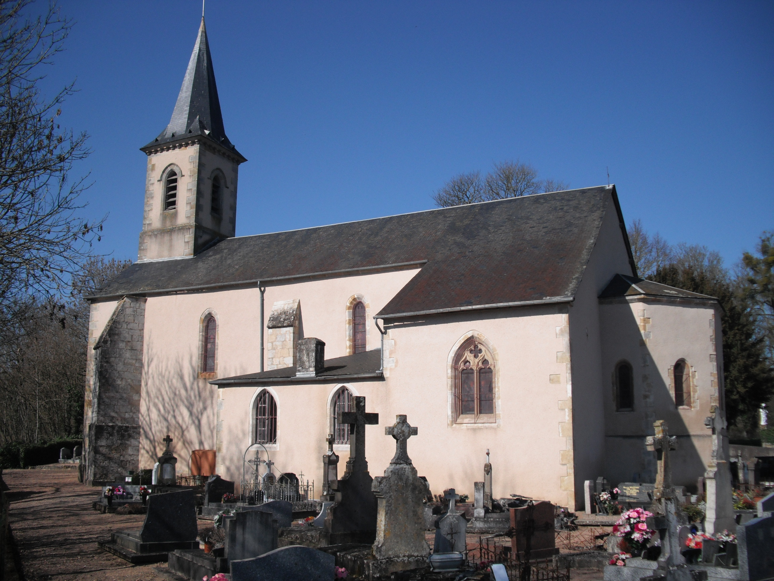 L'église d'Anlezy (Nièvre, France).